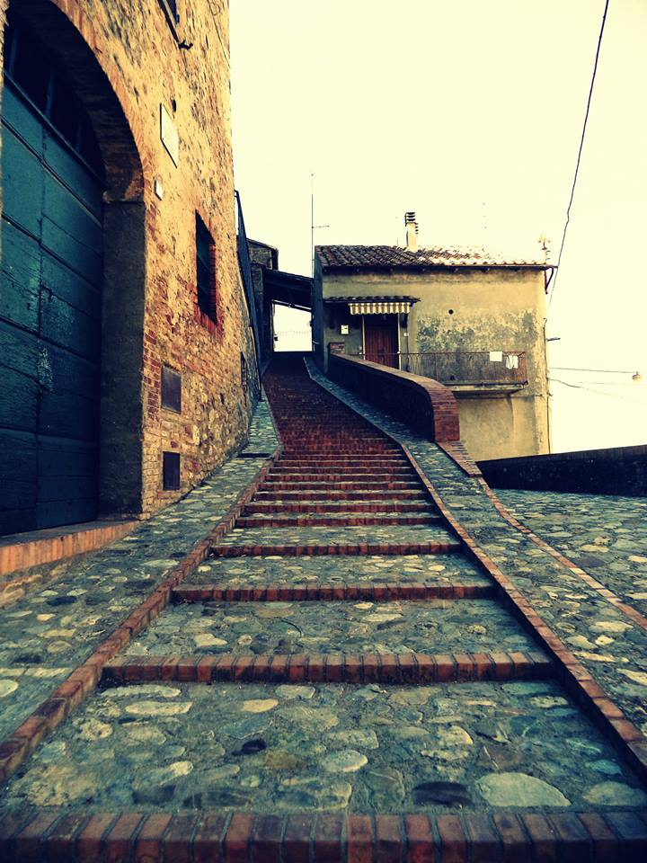 Scalette